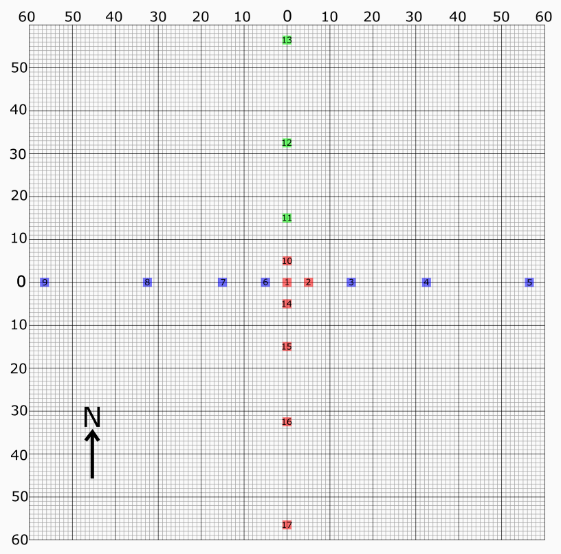 Расположение буйковых станций, установленных в эксперименте «Полигон-70». Красным отмечены буйковые станции, обслуживавшиеся НИС «Дмитрий Менделеев», синим — обслуживавшиеся НИС «Академик Курчатов», зелёным — обслуживавшиеся ЭОС «Андрей Вилькицкий». Центр (место расположения буйковой станции №1) соответствует точке с координатами 16,5 градуса северной широты, 33,5 градуса западной долготы.Вверху и сбоку подписаны расстояния от центральной точки в морских милях. Источник: Корт В.Г., Нейман В. Г. Атлантический гидрофизический полигон 1970 г. // Атлантический гидрофизический полигон-70 : Метеорологические и гидрофизические исследования / Редакторы В. Г. Корт, В. С. Самойленко; Академия наук СССР; Институт океанологии имени П. П. Ширшова. — М.: Наука, 1974. — С. 3—19.